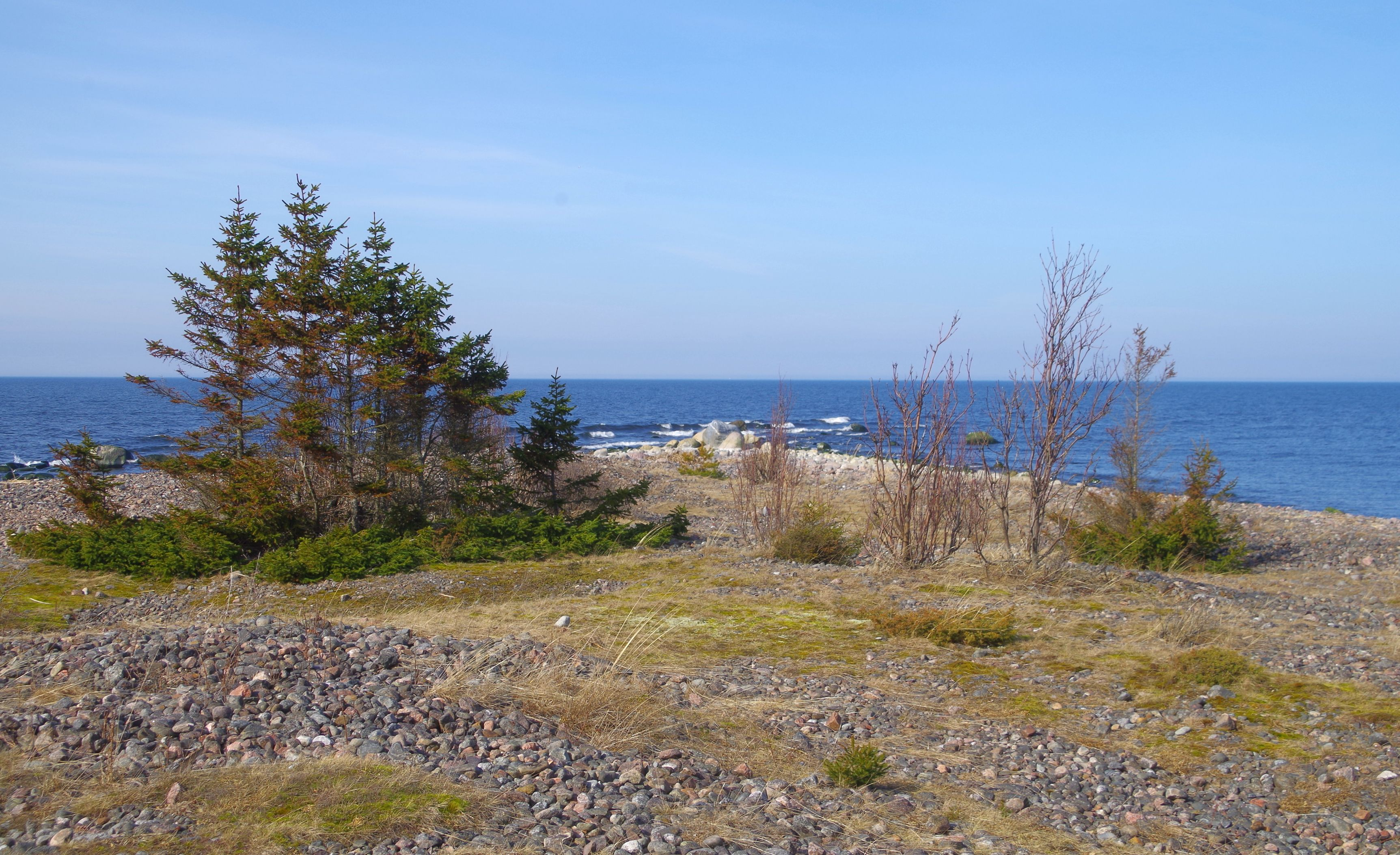 Juminda poolsaar on poolsaar Kolga ja Hara lahe vahel, Kuusalu vallas Harjumaal.